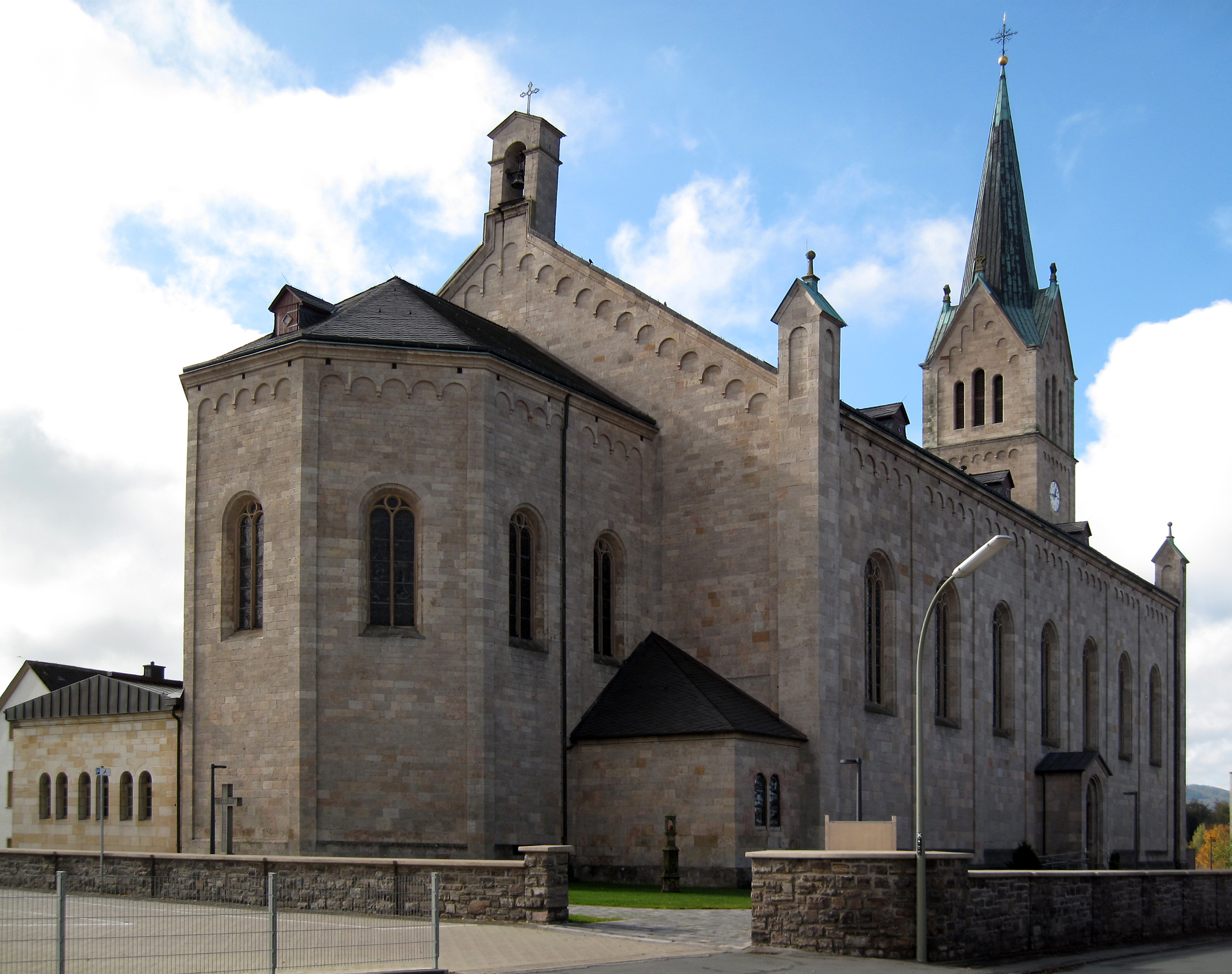 Medebach, Sankt Peter und Paul, Ost-Nord Ansicht